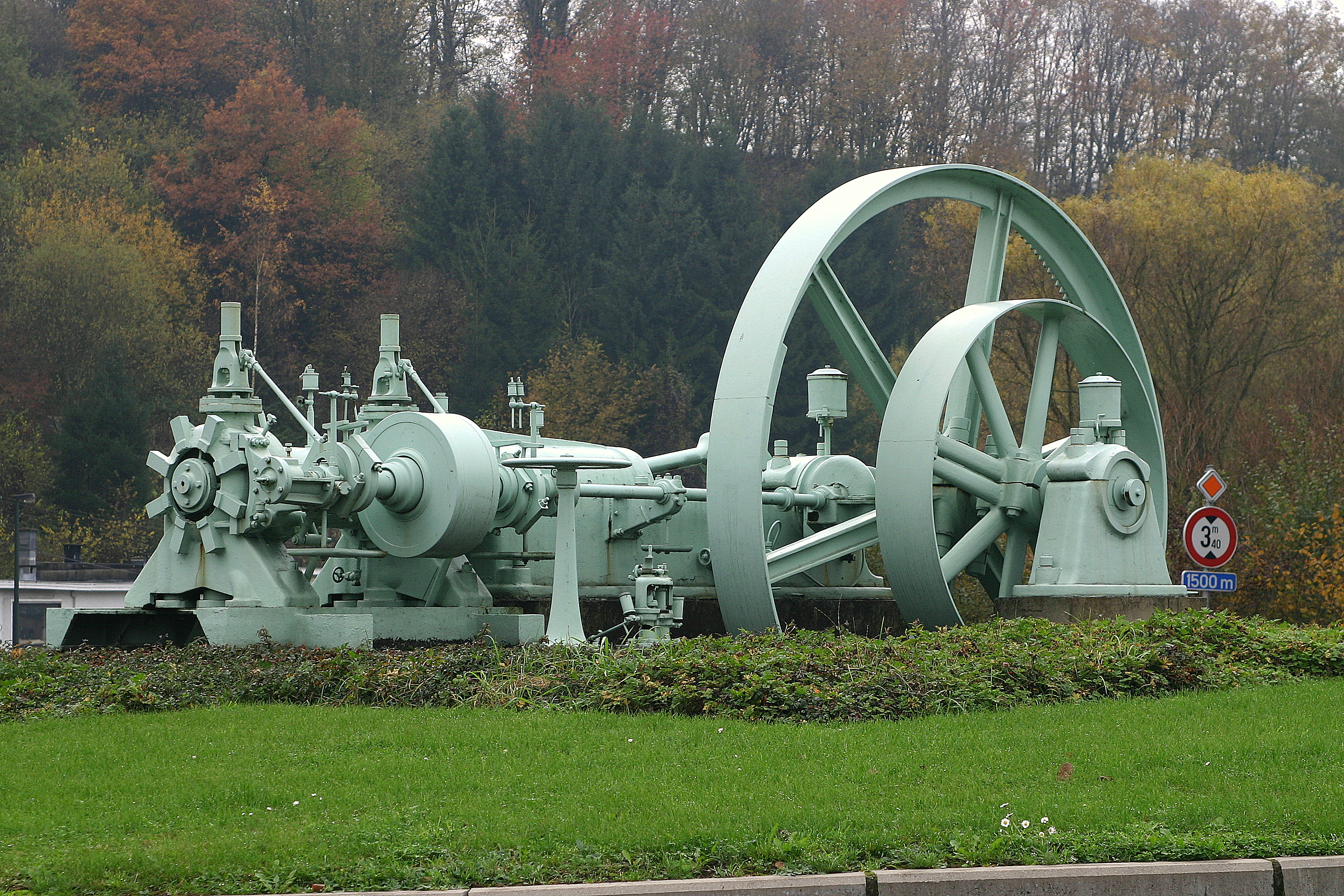 Dampmaschinn vun der Firma Intervapeur um Rond-point vun der N61 tëscht Verviers a Limbourg